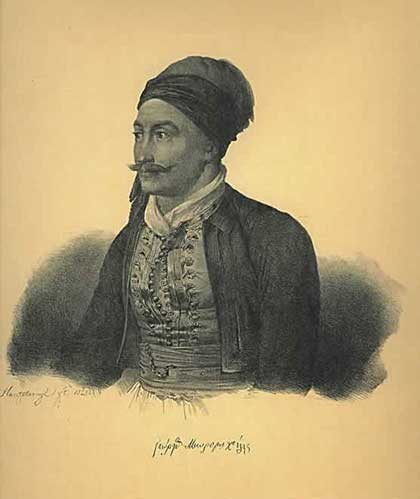 griechischer Freiheitskämpfer, 1821